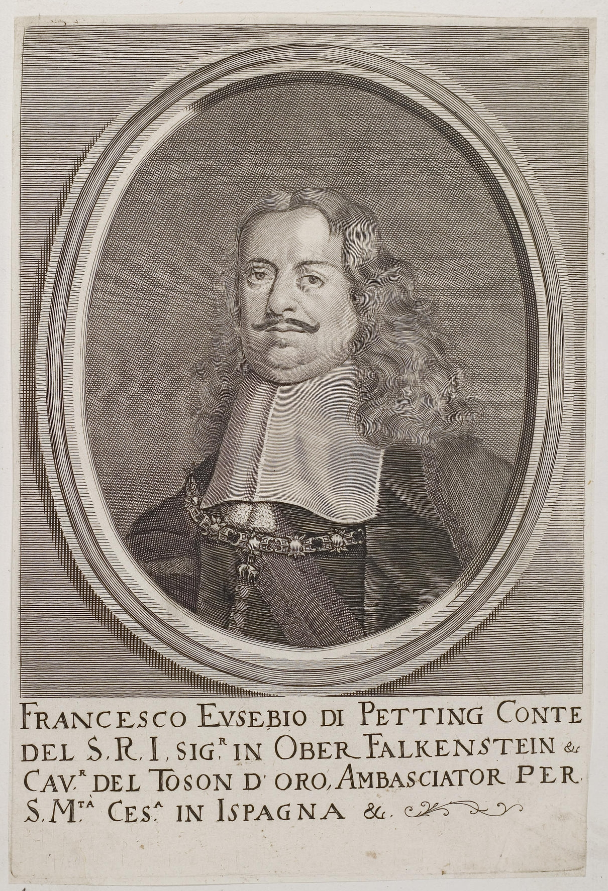 Grafik aus dem Klebeband Nr. 2 der Fürstlich Waldeckschen Hofbibliothek Arolsen Motiv: Francisco Eusebio von Pötting (1627–1678), Österr. Diplomat, Graf von Pötting, 10 Jahre Botschafter in Spanien